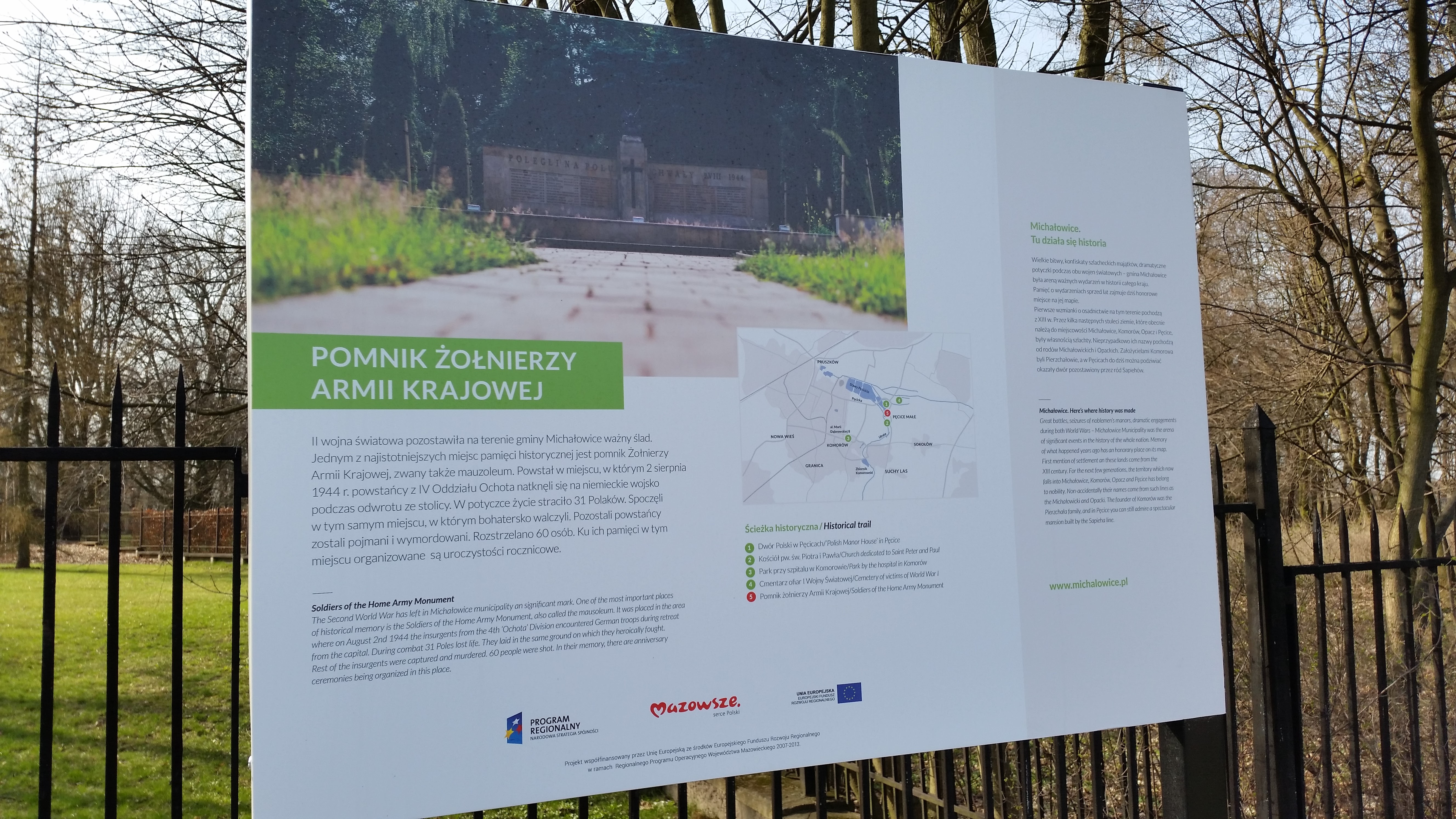 Tablica informacyjna przed wejściem na teren mauzoleum Żołnierzy Armii Krajowej z IV Oddziału Ochota, walczących w Powstaniu Warszawskim, poległych 2 sierpnia 1944